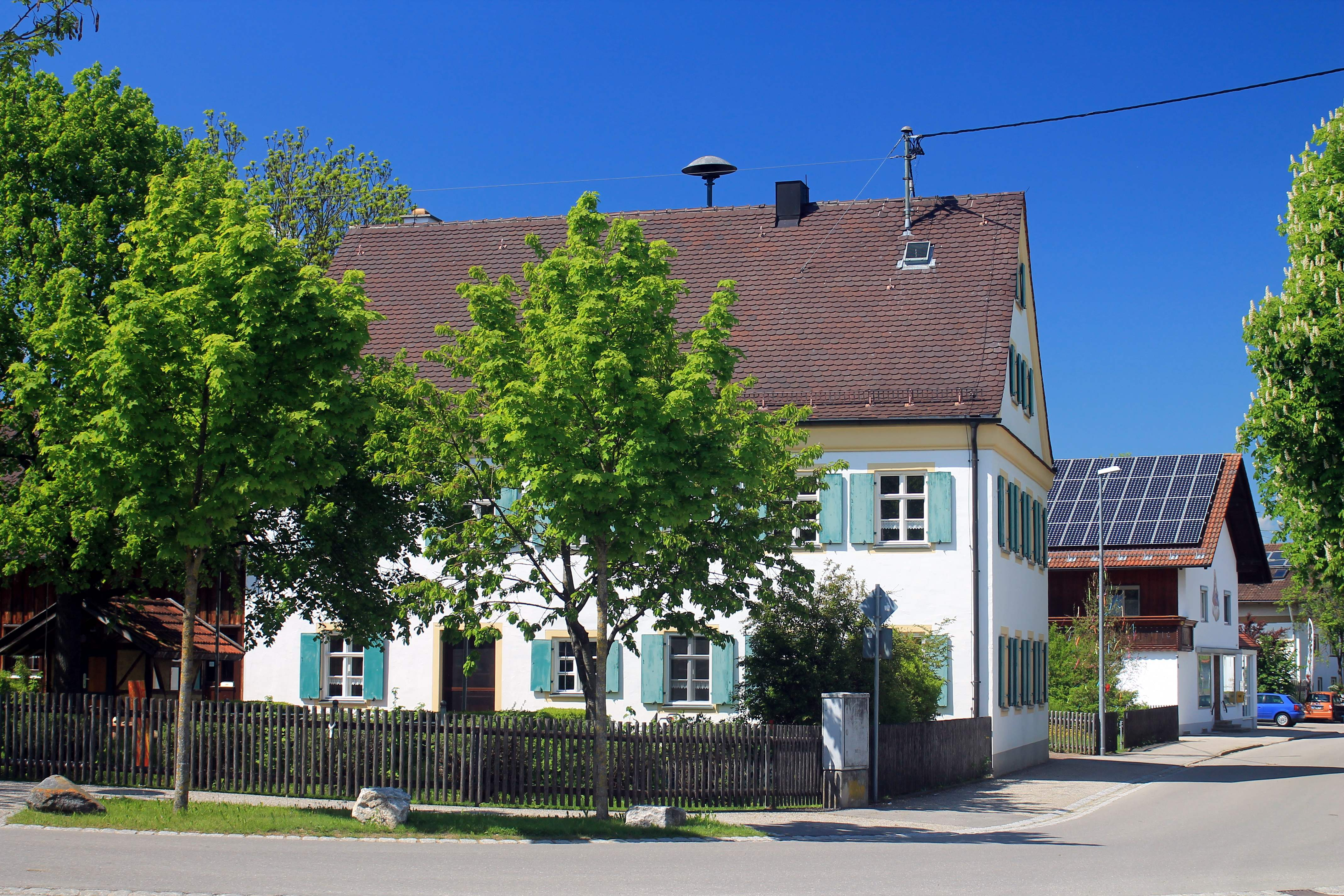 Baudenkmal in Irsingen (Türkheim), Dorfstr. 42, Denkmalnummer D-7-78-203-50